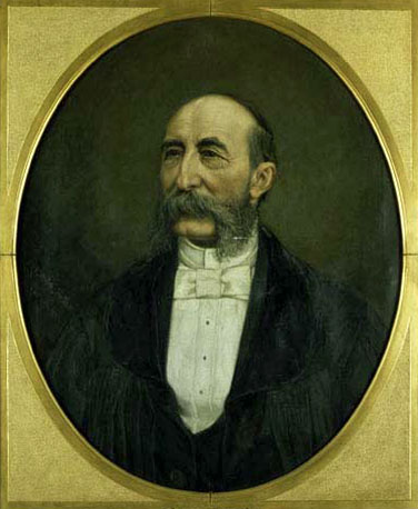 Margarete Loewe: Porträt Reinhold Bechstein, 1895, Porträtsammlung Universitätsarchiv Rostock